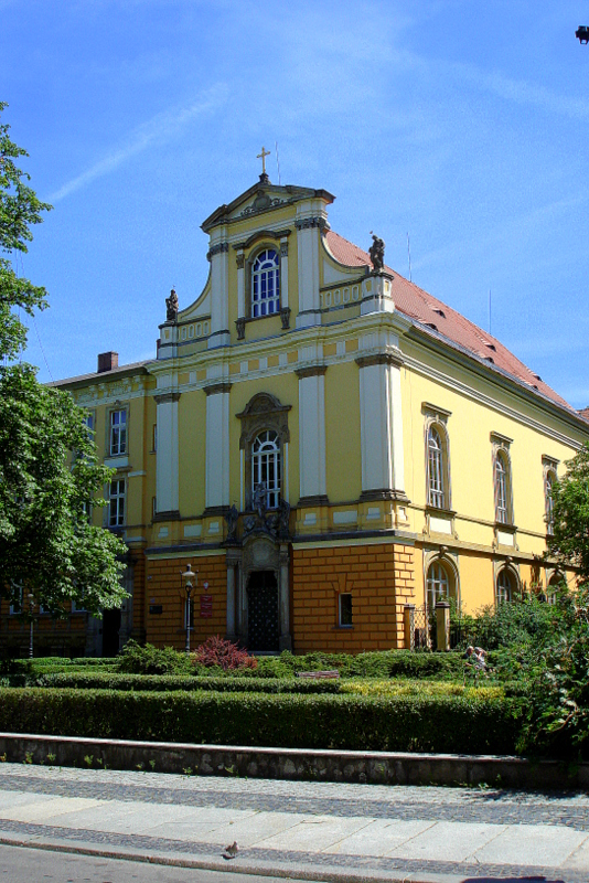 Legnica, I Liceum Ogólnokształcące